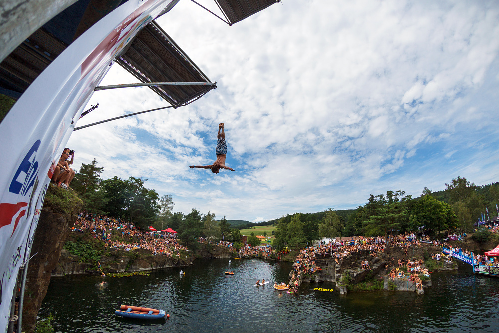 Zavody Highjump 2012 foto02